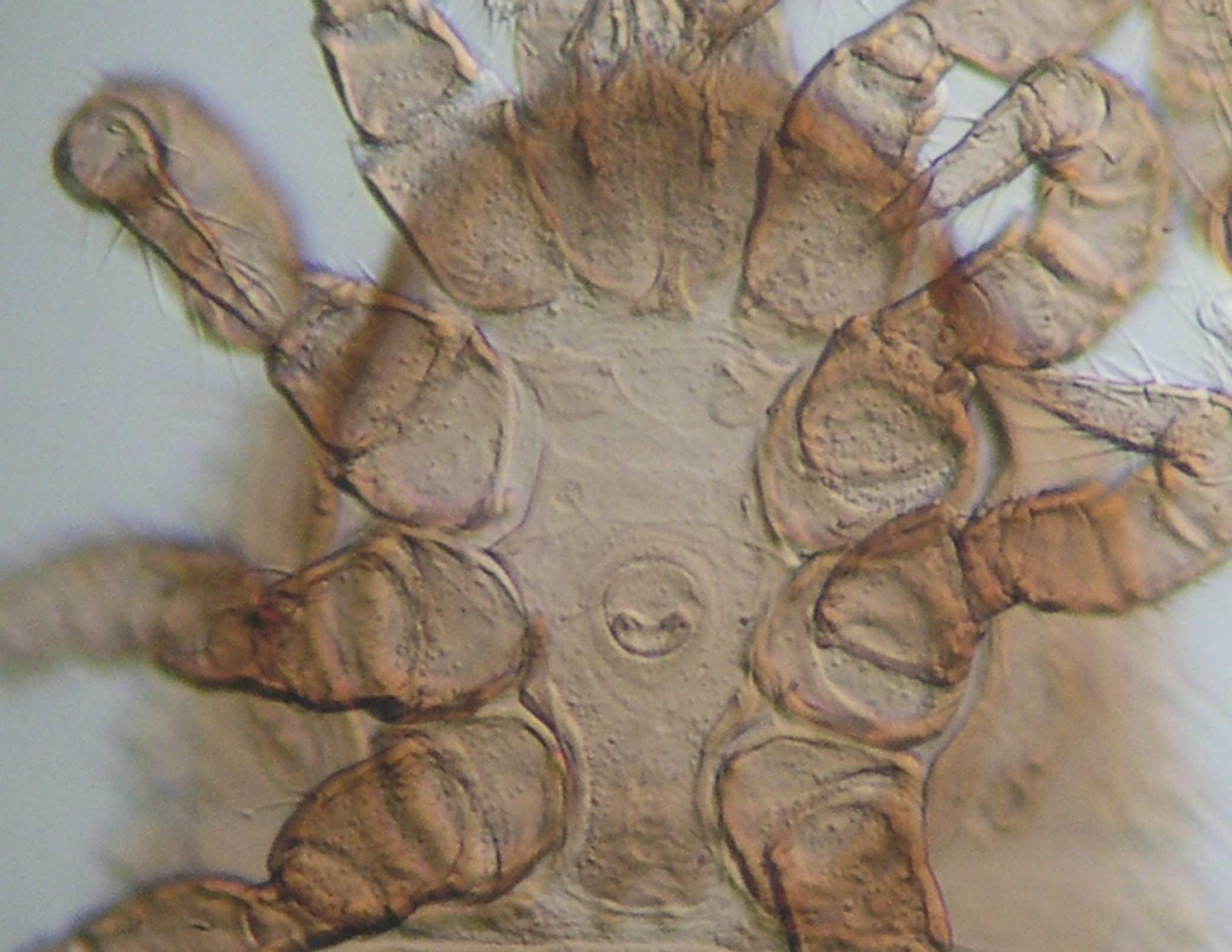 Sternalschild von Zercon sp. mit männlicher Geschlechtsöffnung